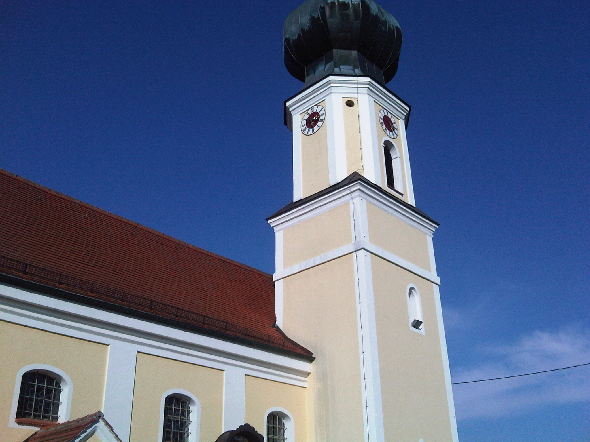 Kirchturm Mittbach Bayern